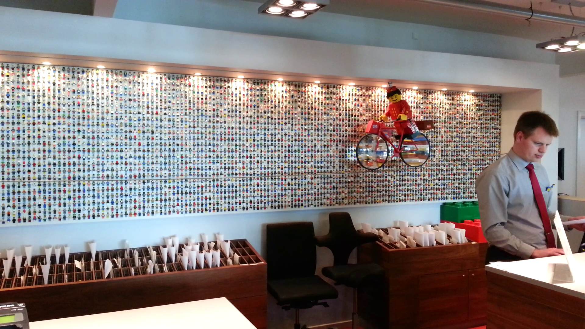 Выставка минифигурок Лего на ресепшн гостиницы. Леголенд, Биллунд.